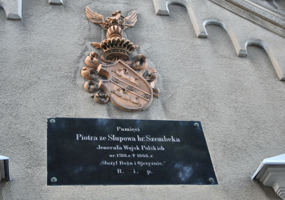 Tablica pamiątkowa hr Szembeka na murach kościoła